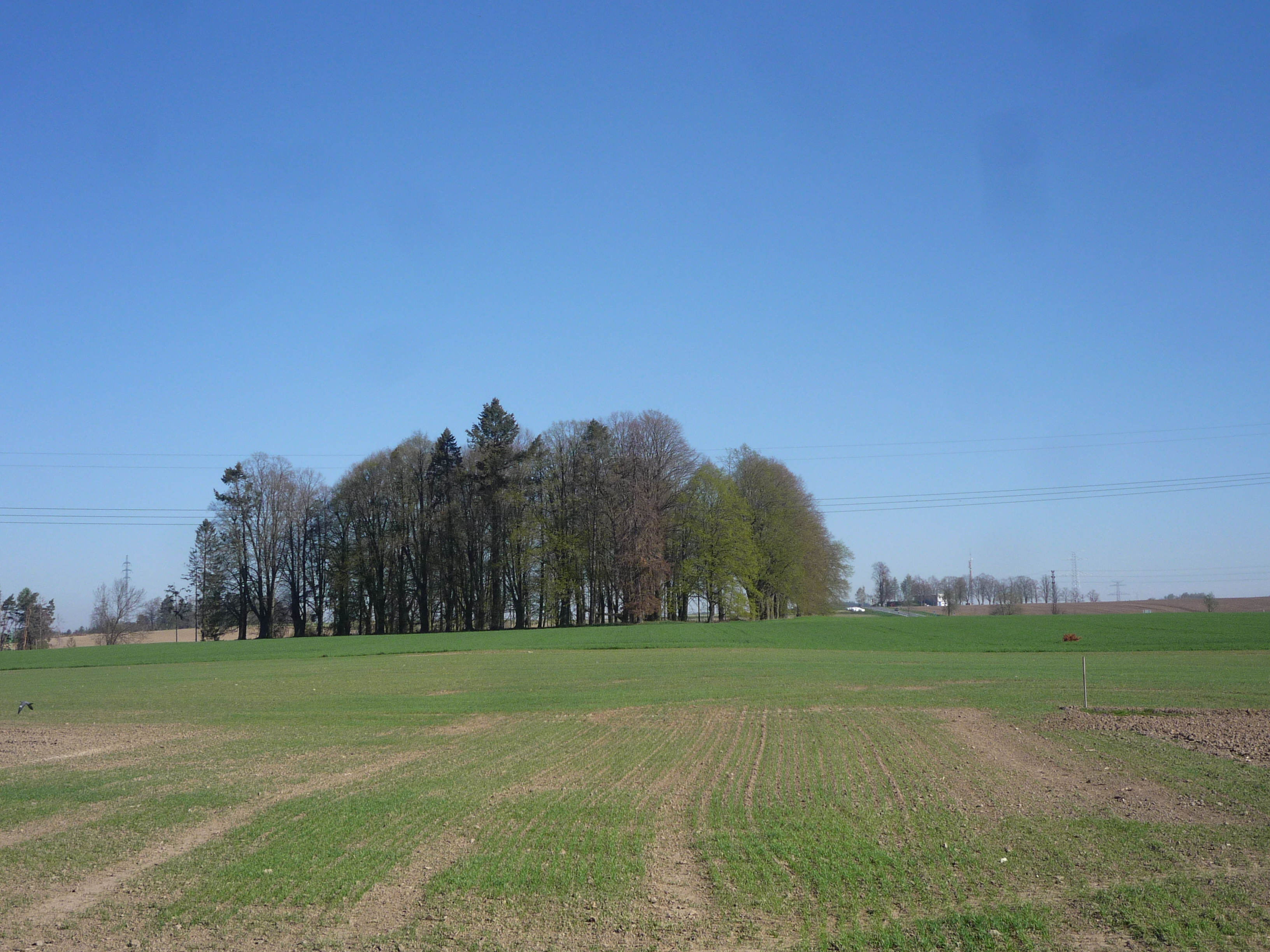 Autor fotografie Jiří Zelenka. Židovský tyfový hřbitov (Havlíčkův Brod). Židovský hřbitov byl vybudován v roce 1917. Pochované osoby pocházejí ze sběrného tábořa židovských uprchlíků z Haliče a Bukoviny. Tento hřbitov se nachází asi 500 m od konce Nového hřbitova. U hlavní silnice 38. - (asi 200 m severozápadně) směrem na Prahu. Havlíčkův Brod. Kraj Vysočina. Czech Republic.